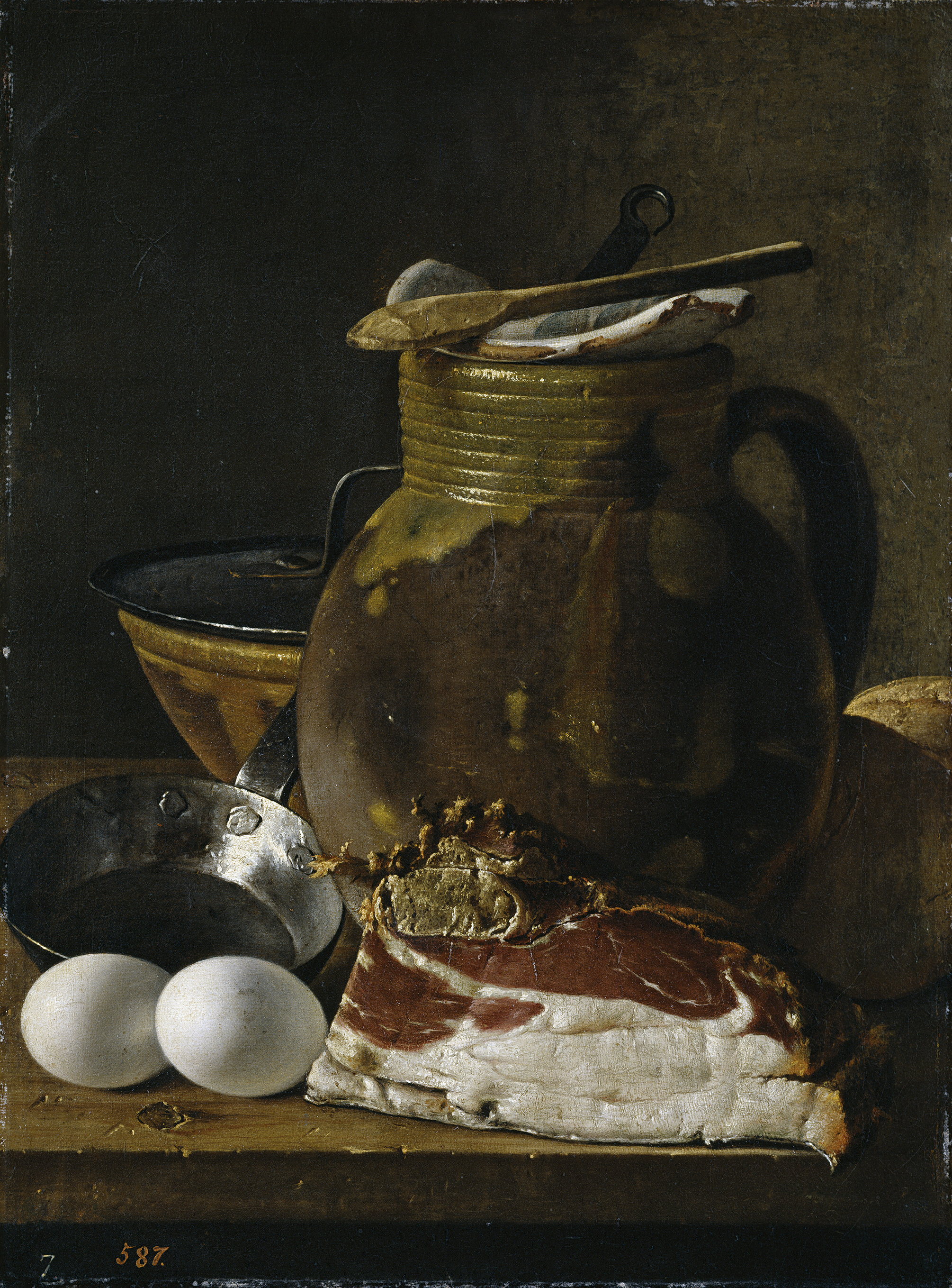 Bodegón con jamón, huevos y recipienteslabel QS:Les,"Bodegón con jamón, huevos y recipientes"